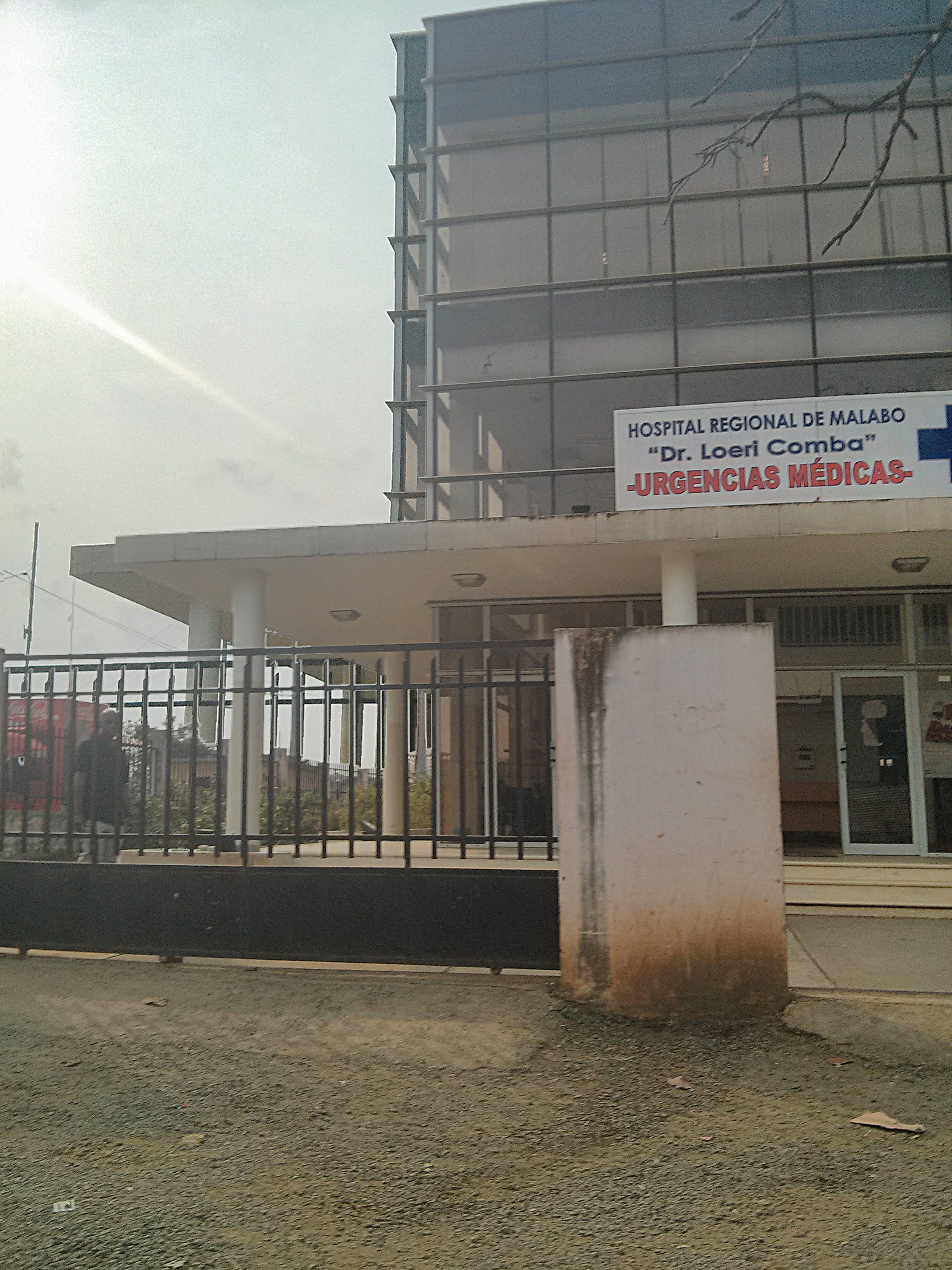 Hospital Regional De Malabo - Urgencias Medicas